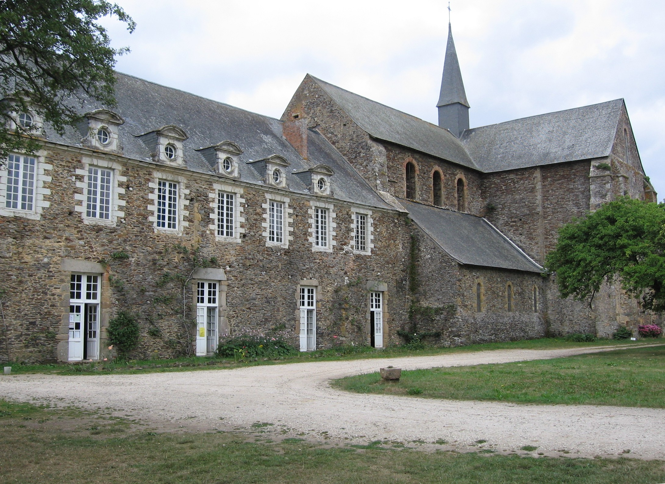 Bâtiment des hôtes et église de l'abbaye de Clermont (France)